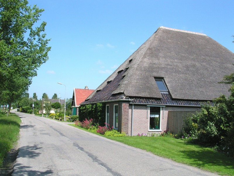 Het dorpsgezicht van Lutjewinkel. The village of Lutjewinkel.